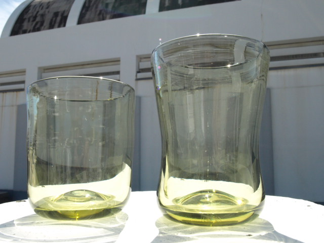 新島のガラス製作体験コーナーではオリジナルが製作できる。